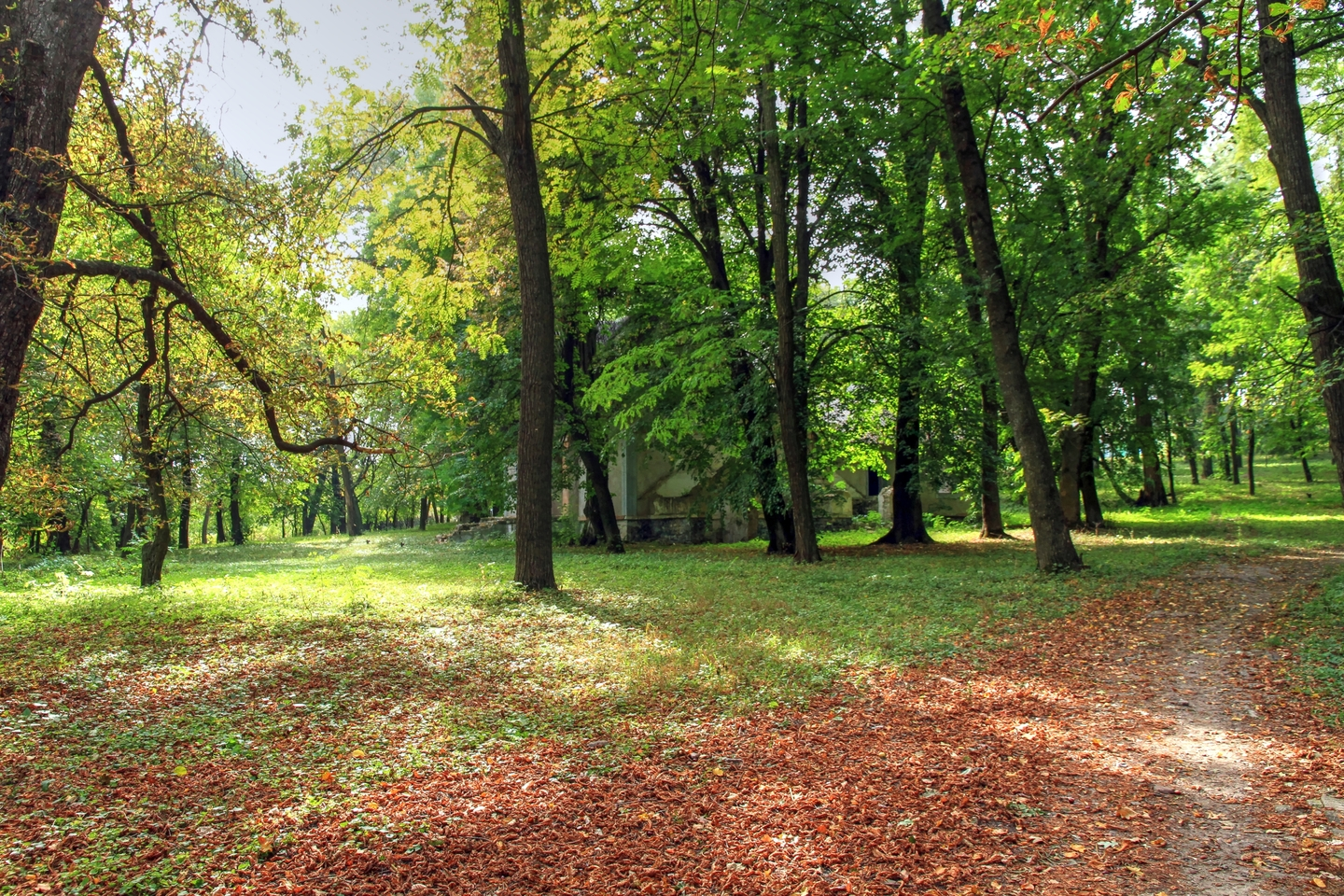 Темелеуцкий парк, монумент природы, находится в Приднестровия, Каменский район, с. Темелеуць (код MD-CC-map-005)